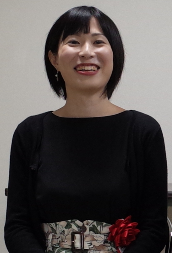 加藤圭女流1級。2019年10月19日、棋士会みやぎ将棋フェスティバルにて。